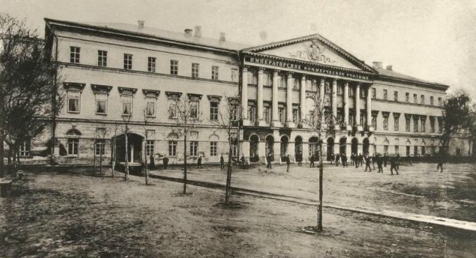 Здание Московского Коммерческого училища на Остоженке